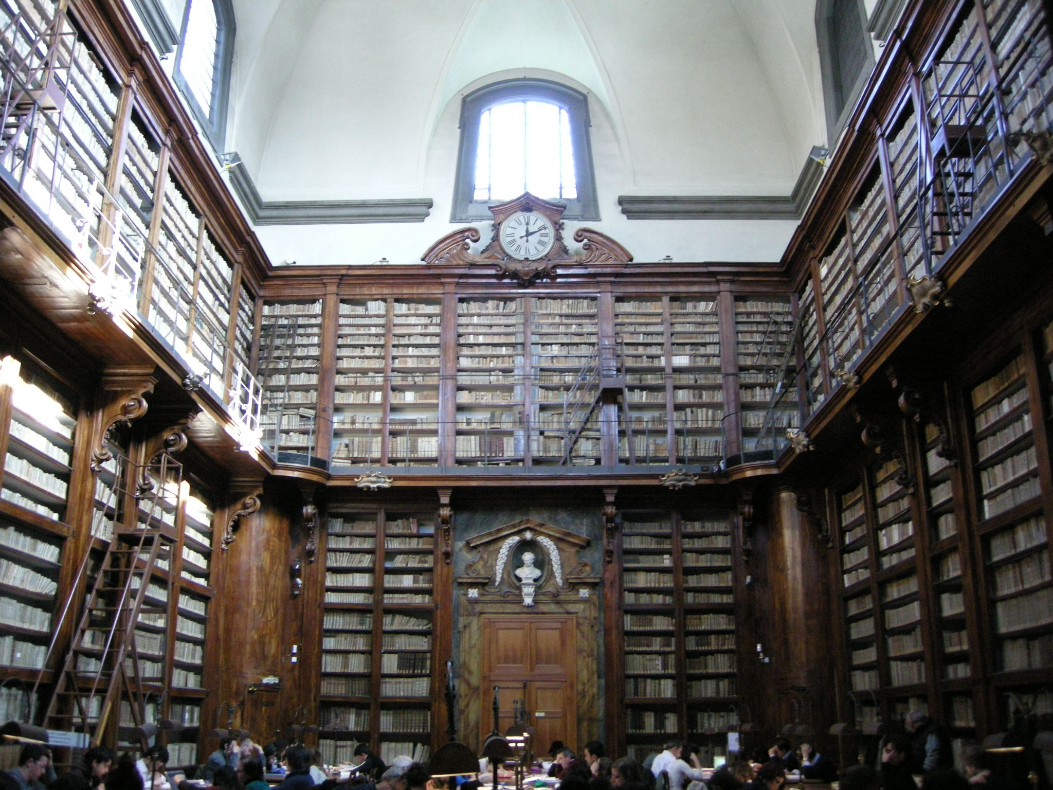 Biblioteca marucelliana